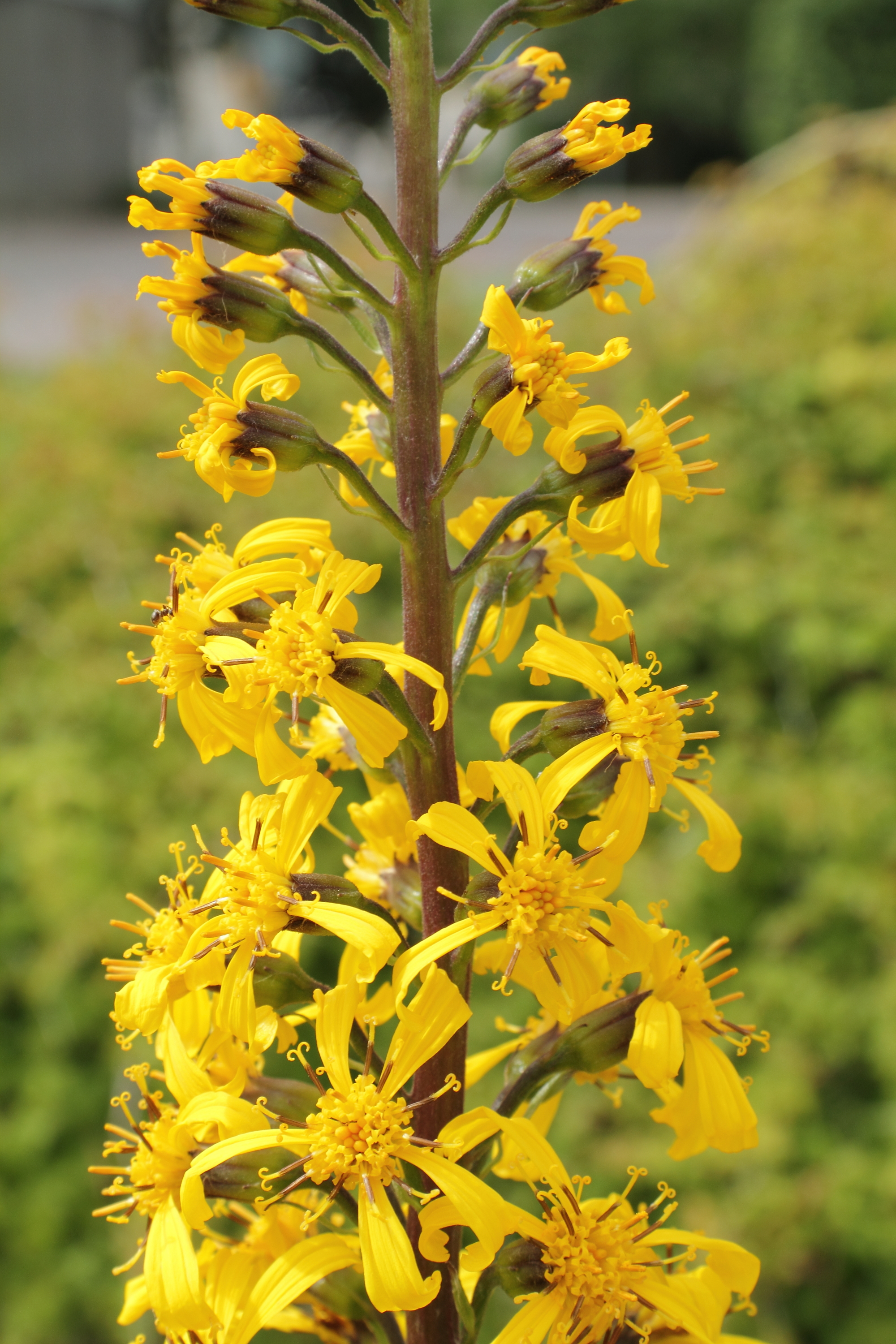 Ligularia wilsoniana at Uppsala Botanic Gardens